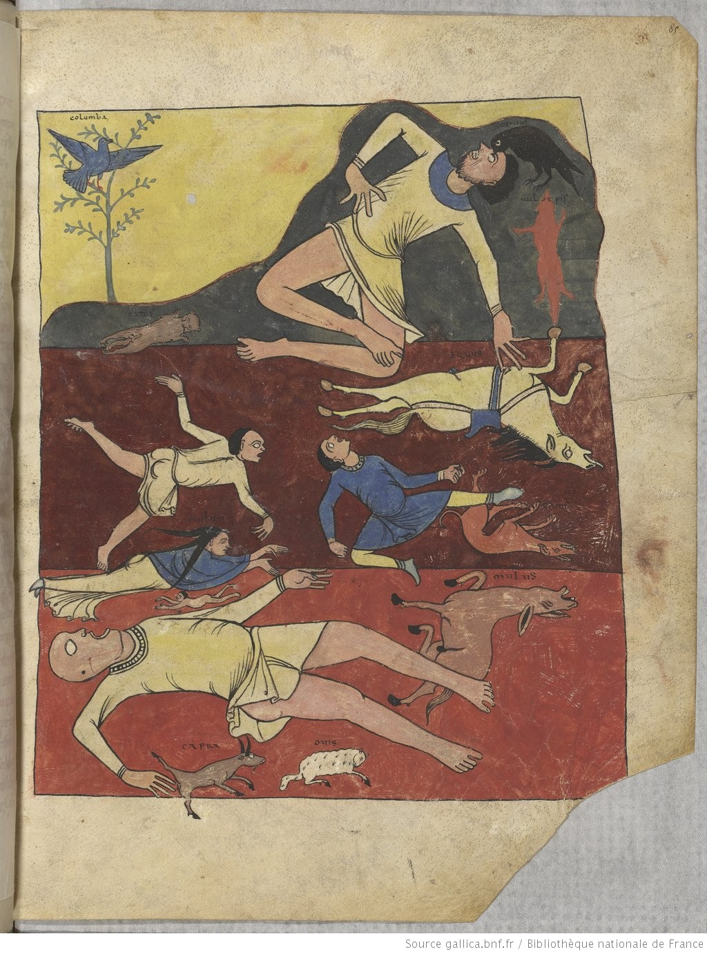 Eluminure Apocalypse de Saint Sever. f.85r, Deluge